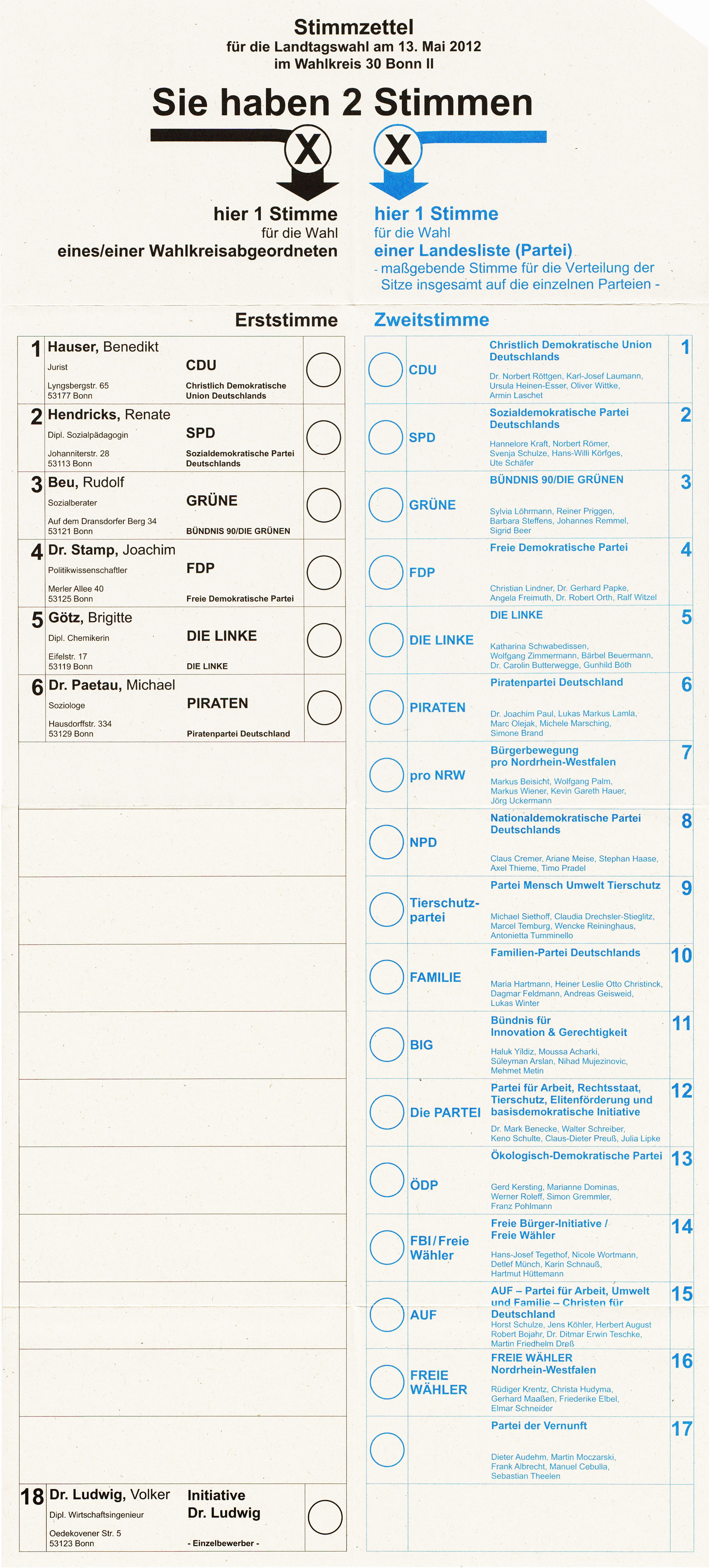 Da ich am Wahltag unterwegs bin, mache ich dieses Mal meine erste Briefwahl. Flickr lässt mich leider kein Public Domain auswählen, aber da dies nur ein Scan eines öffentlichen Dokuments ist, trete ich hiermit alle meine Rechte an dem Bild ab.